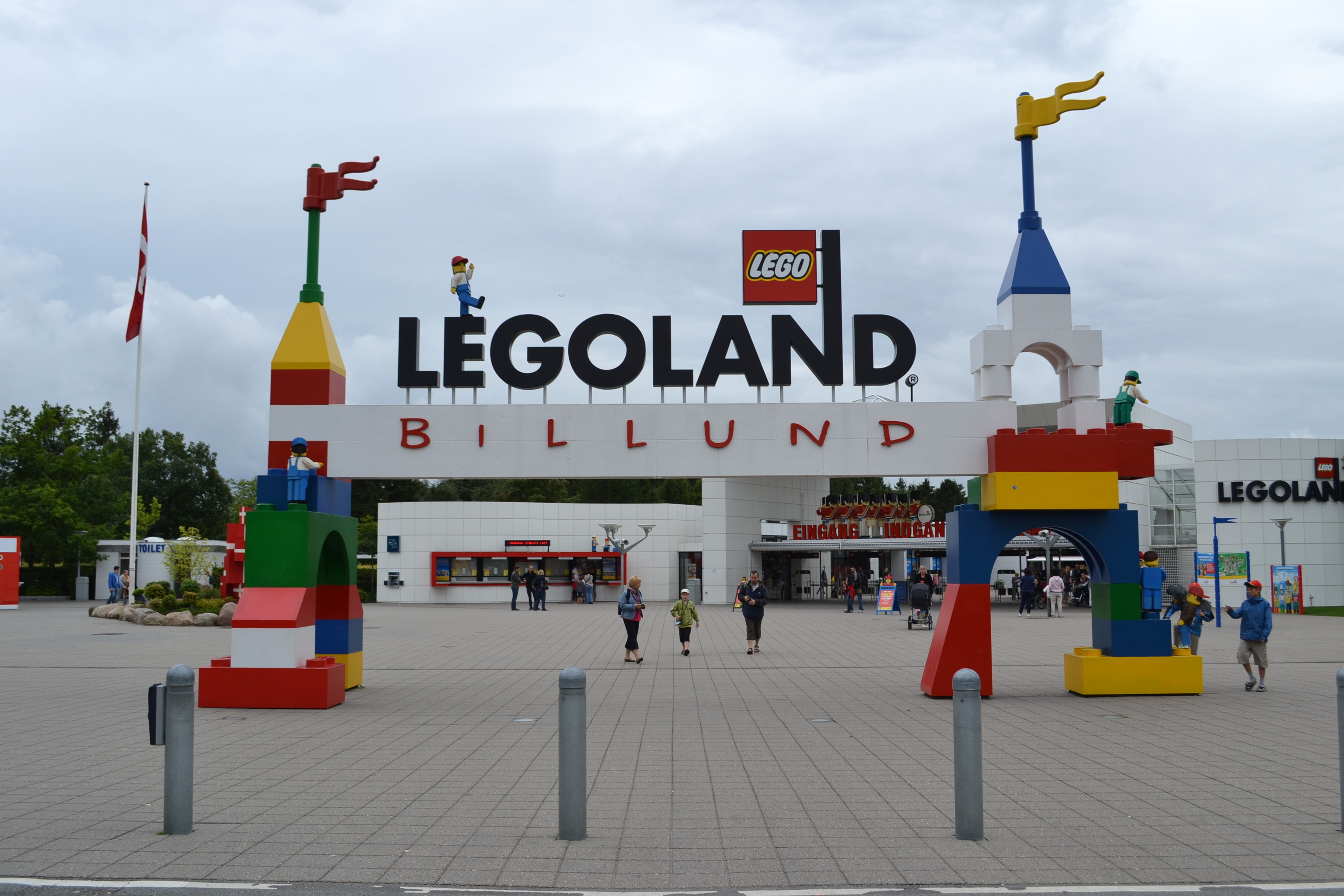 Legoland Billund, Danmark